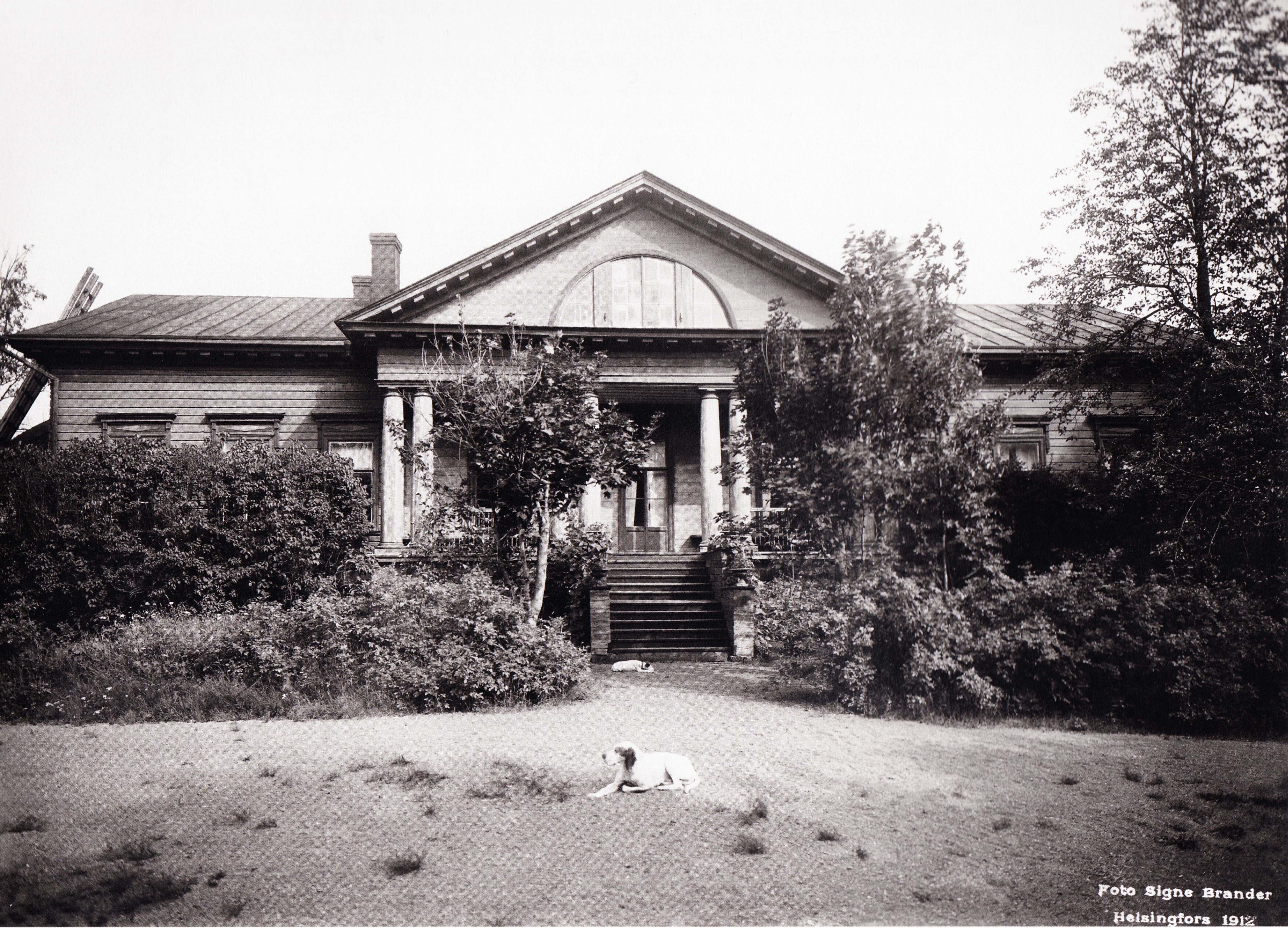 Ala-urpalan kartano